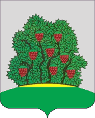 Герб Бежецка, Тверская область